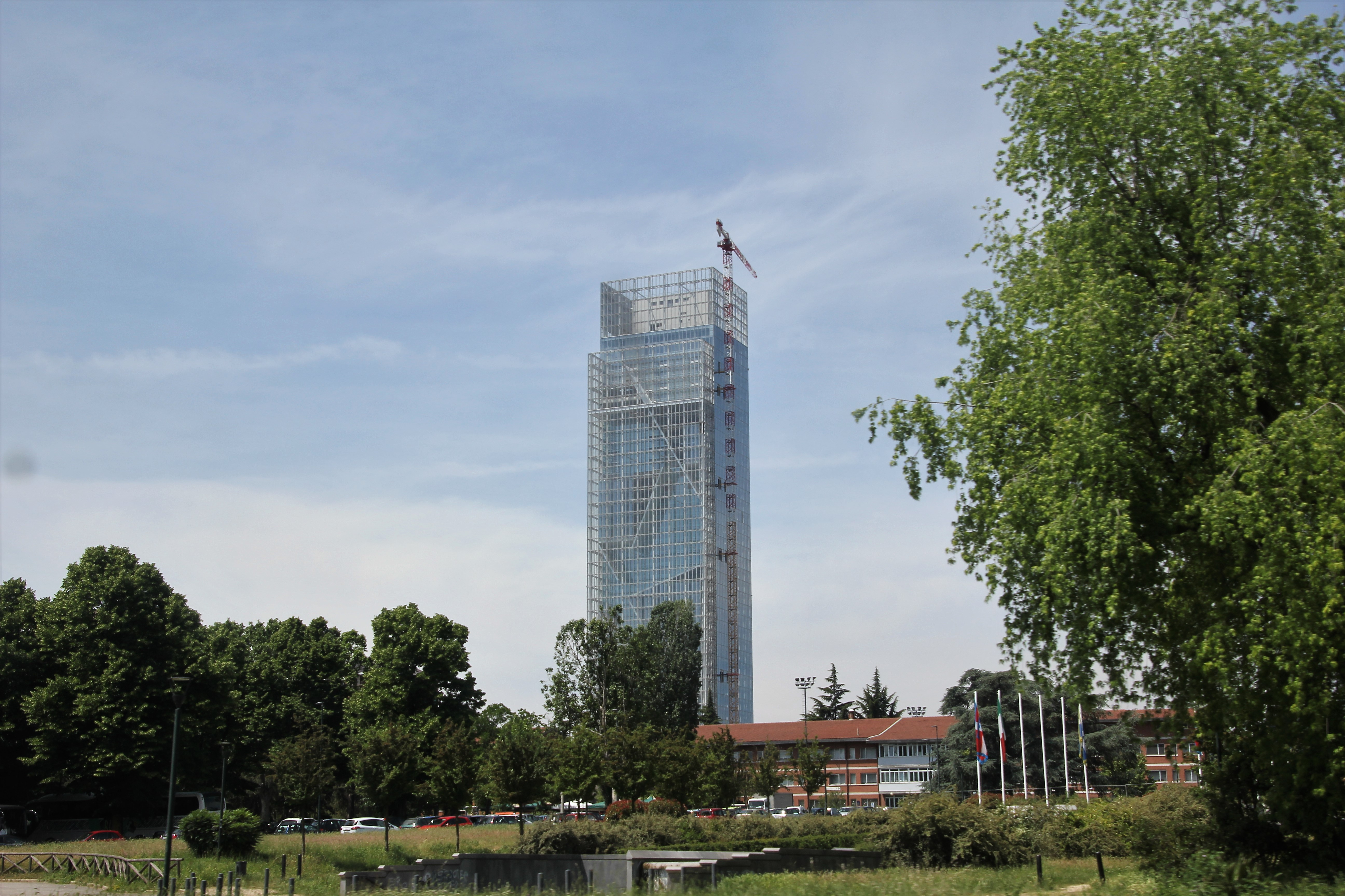 Torino, grattacielo della Regione Piemonte